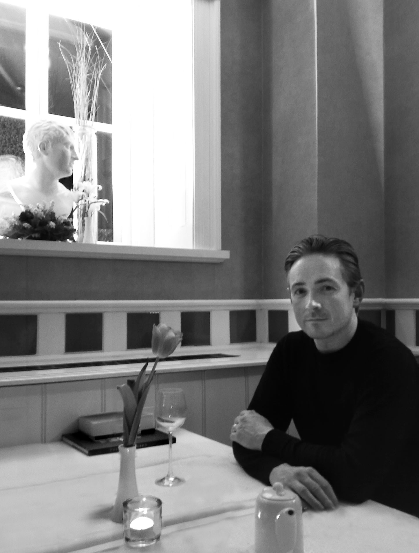 Michael McGlynn Anuna